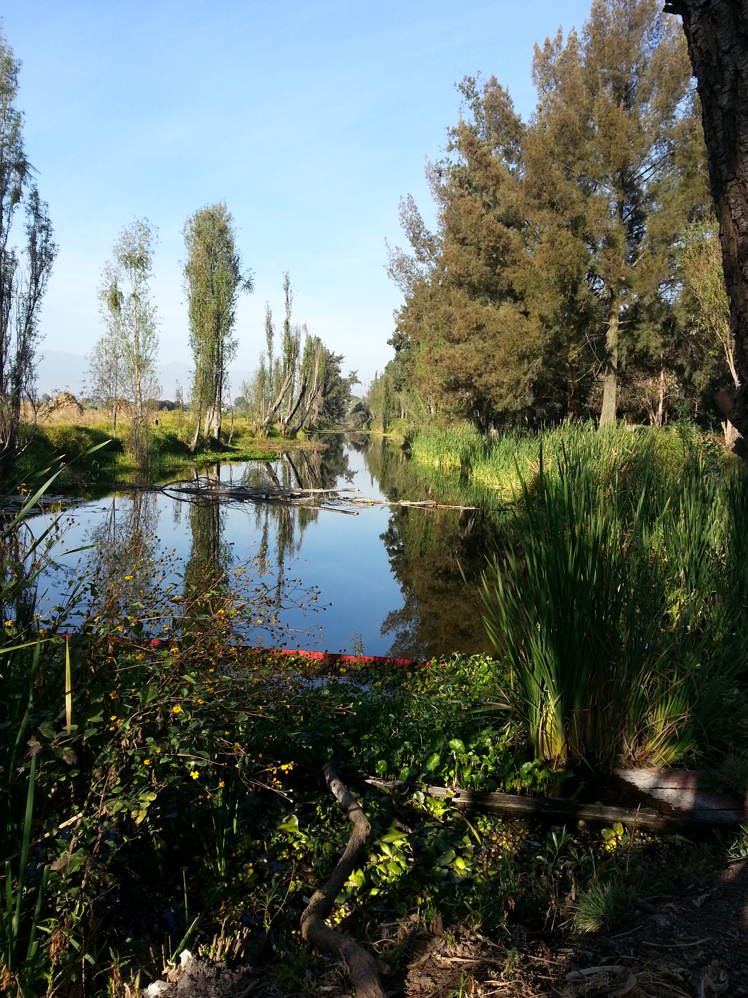 Paisaje de la cienega chica ubicada en Xochimilco, Ciudad de México, México.